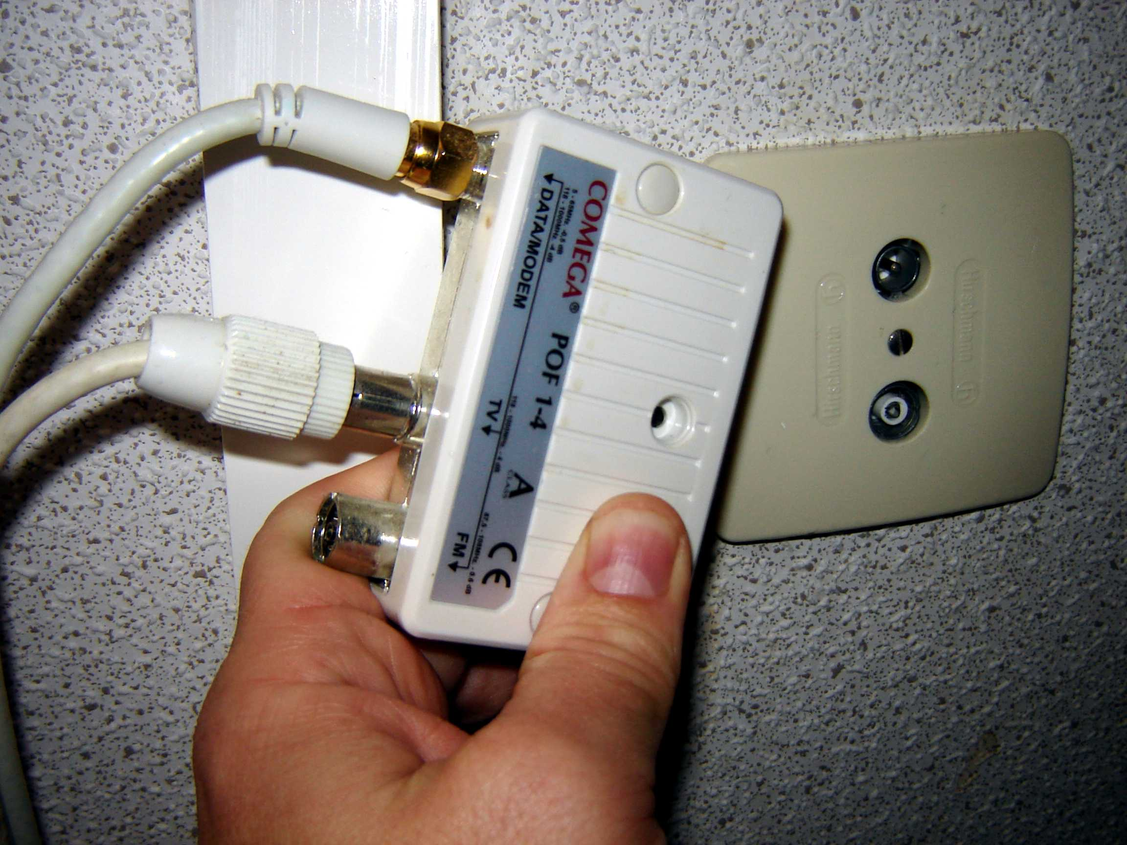 Aufsteckadapter für die Internetnutzung an einem bidirektionalen Kabelanschluss, wenn die Kabeldose in der Wohnung nicht nachgerüstet wurde. Der Adapter enthält einen Breitbandfilter, der das Breitband-Internetsignal aus dem vorhandenen Frequenzspektrum extrahiert und über einen zusätzlichen dritten Anschluss zur Verfügung stellt. Der Aufsteckadapter ist erforderlich, wenn die Rückkanalfähigkeit des Kabelfernsehnetzes bis zum Hausverteiler nachgerüstet wurde, nicht jedoch in einzelnen Wohnungen. Er ergänzt lediglich die alte Antennenanschlussdose, wenn der dritte Anschluss fehlt. Bei einem Kabelanschluss ohne Rückkanalfähigkeit ist der Adapter deshalb wirkungslos.